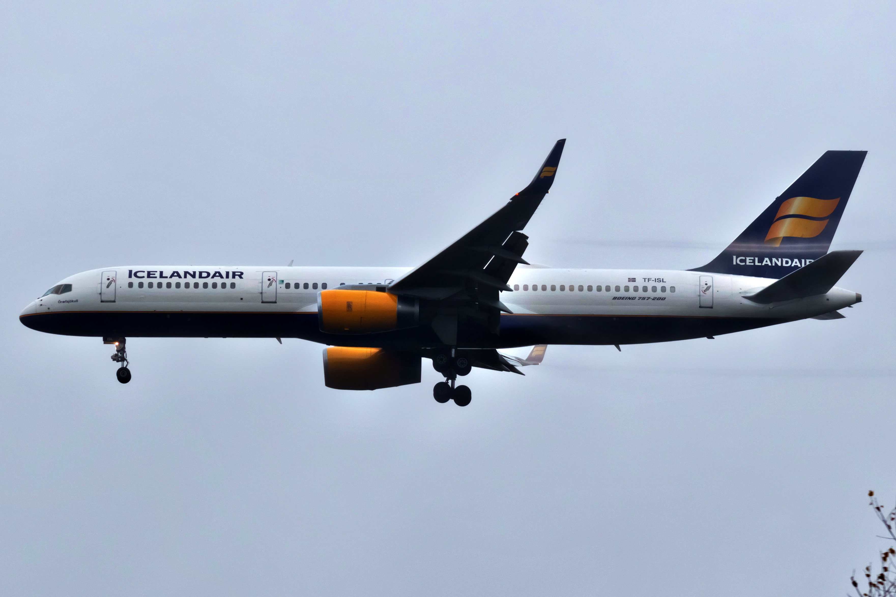 Boeing 757 de Icelandair aterrando no aeroporto de Oslo, Gardermoen.